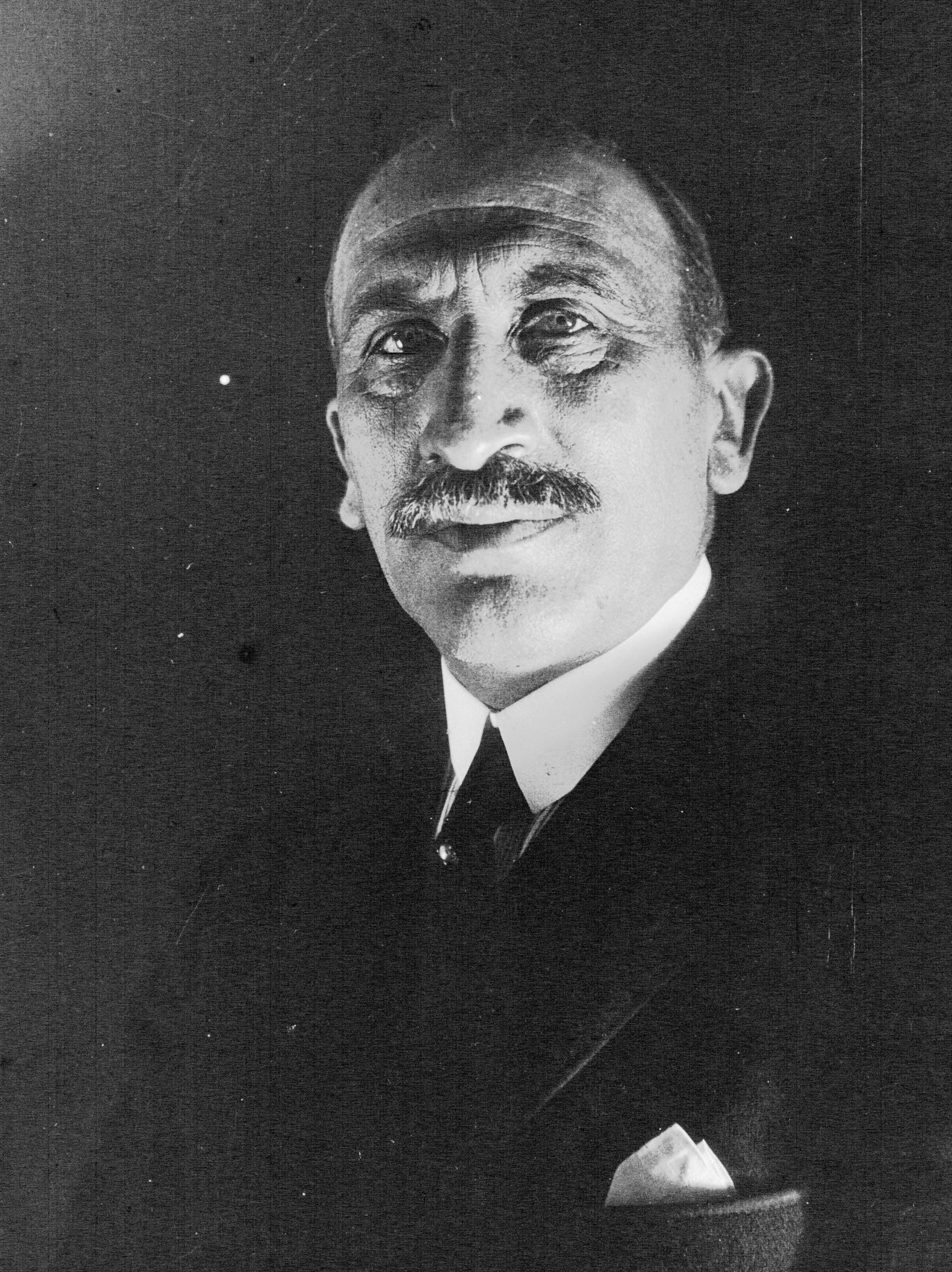 Portrait de Charles de Lasteyrie, député de la Seine [photographie de presse]